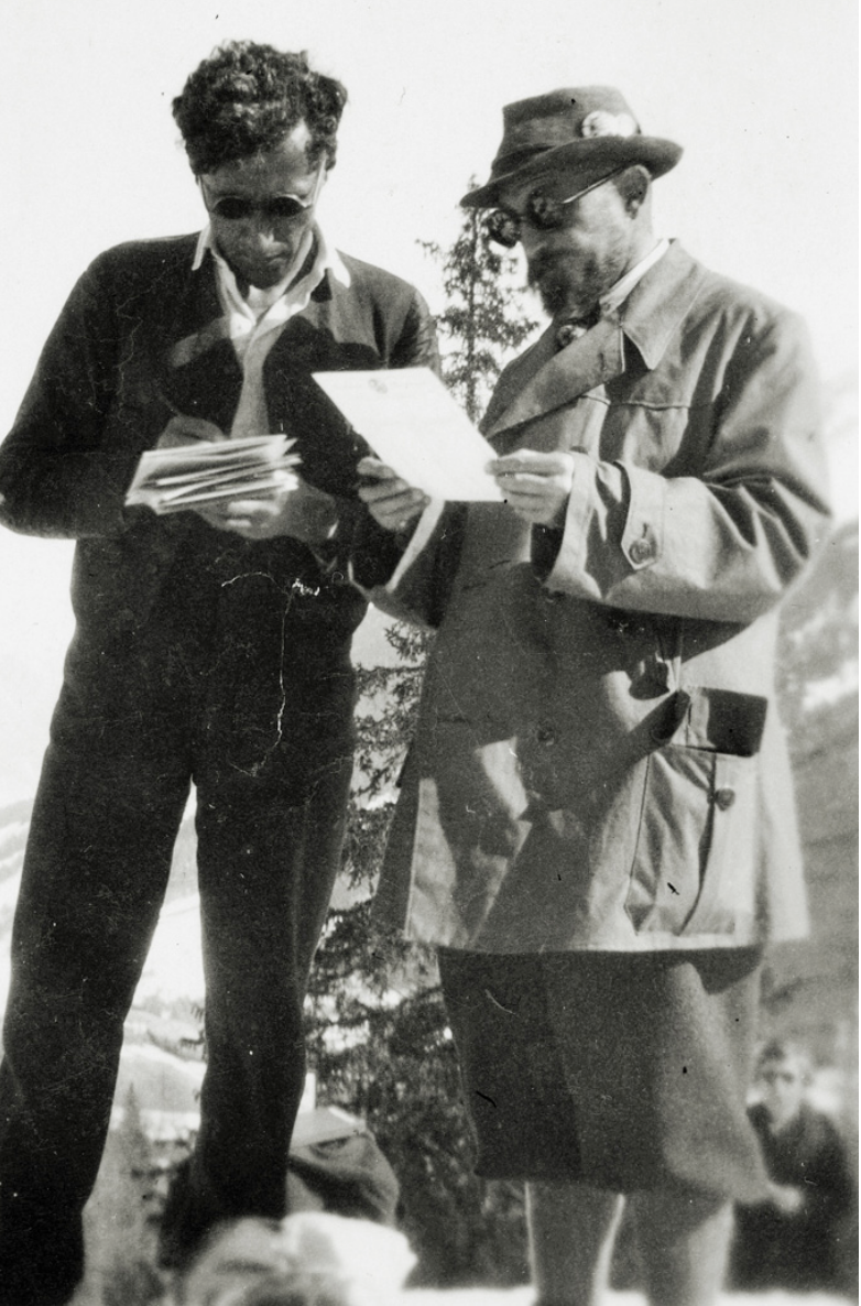 Aufnahme von Rudolf Gomperz beim Zeitnehmen mit Hannes Schneider beim Arlberg-Kandahar-Rennen („AK“)